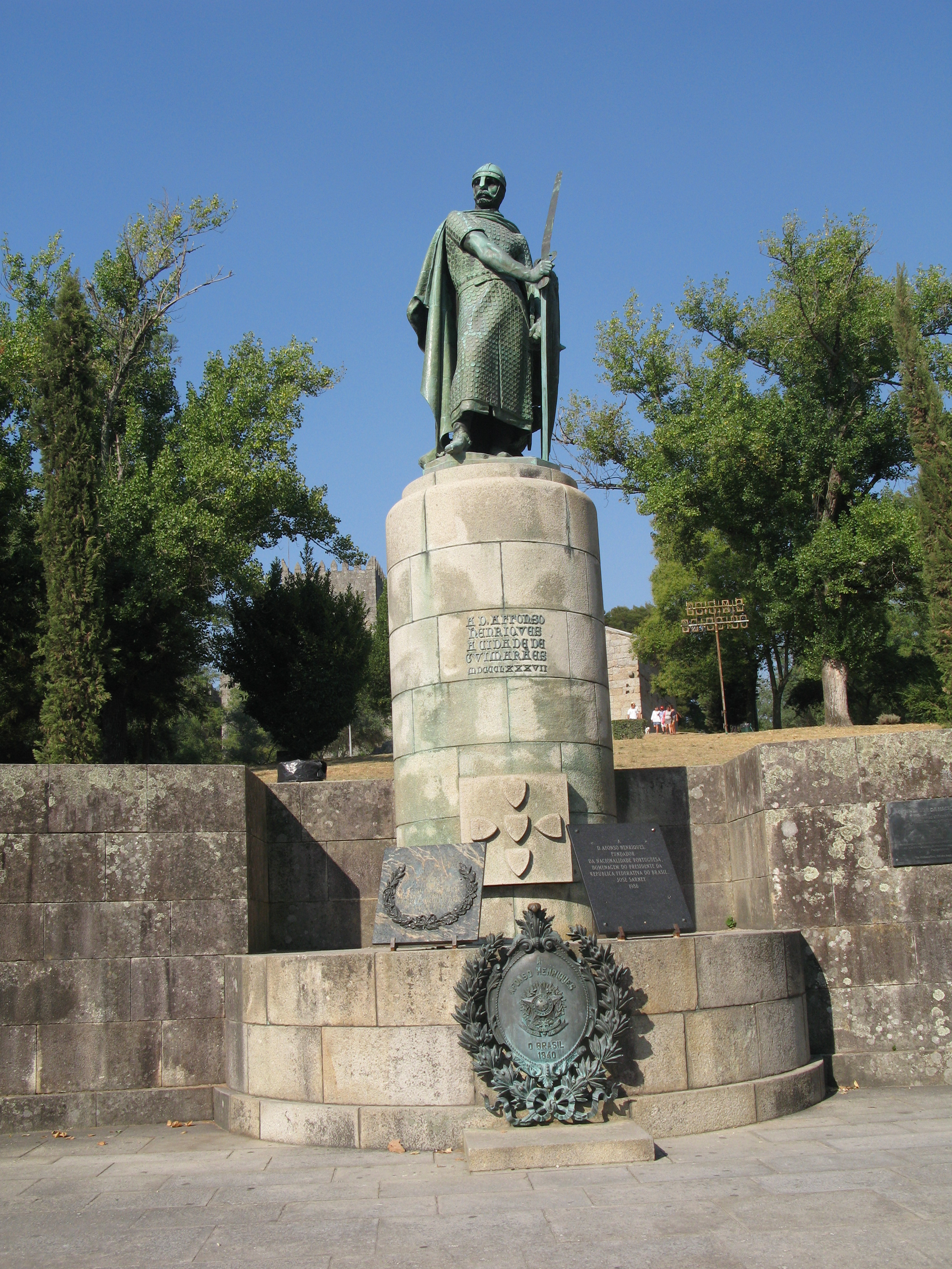 Estátua de D. Afonso localizada na Colina Sagrada, em Guimarães.